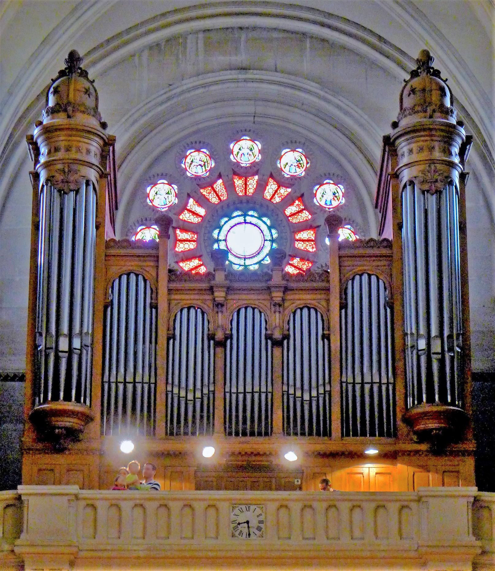 Église Saint-Ambroise (Inscrite) - n°71 boulevard Voltaire - orgue de tribune - Paris XI